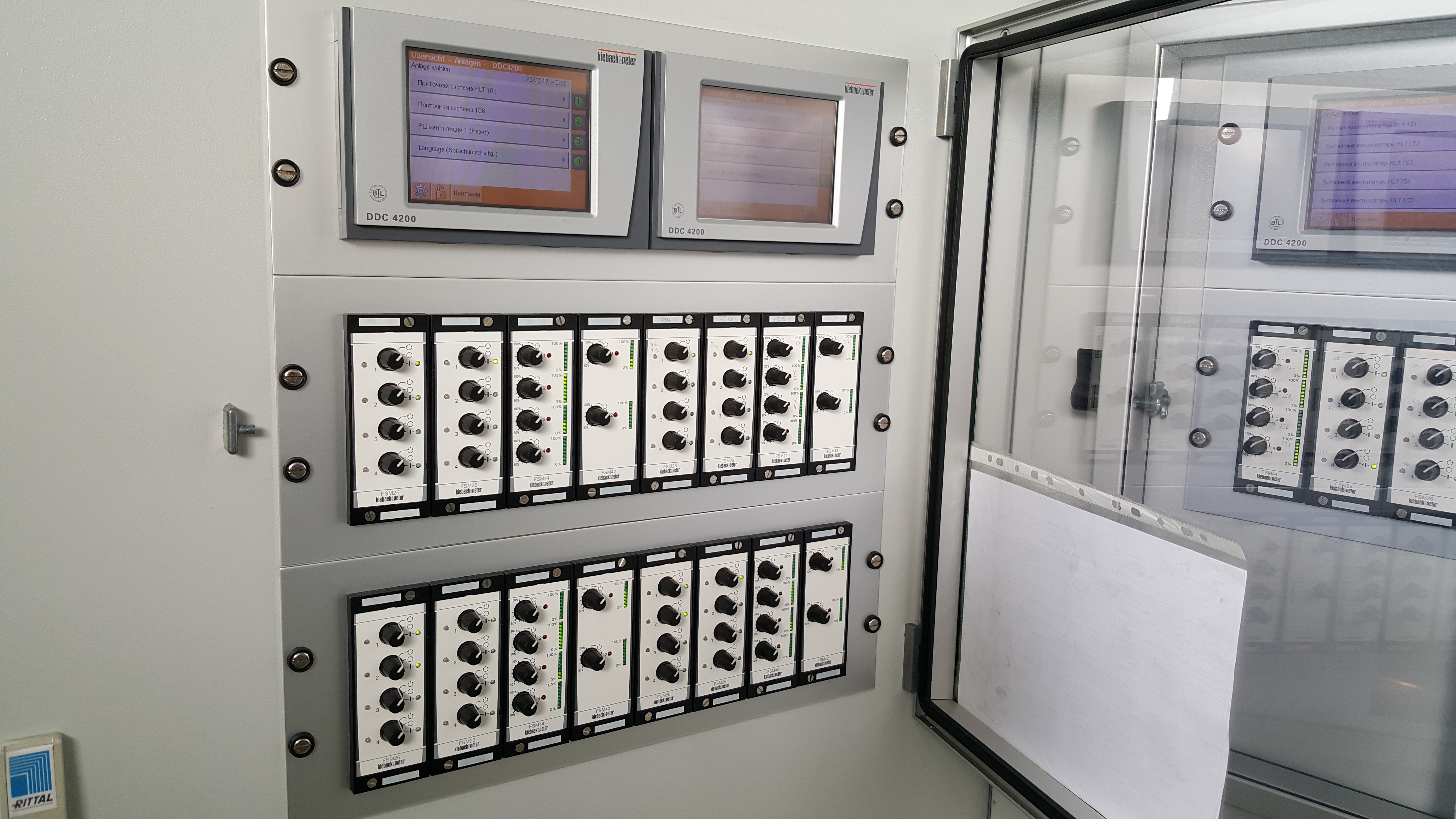 foto panel kp